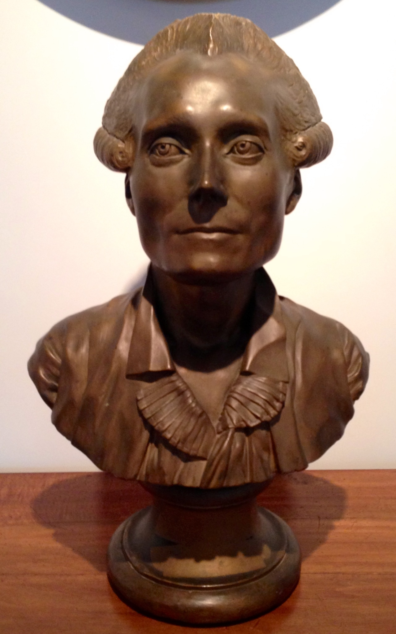 Buste de l'intendant Du Cluzel, France, XVIIIe siècle, bronze, musée des Beaux-Arts de Tours.